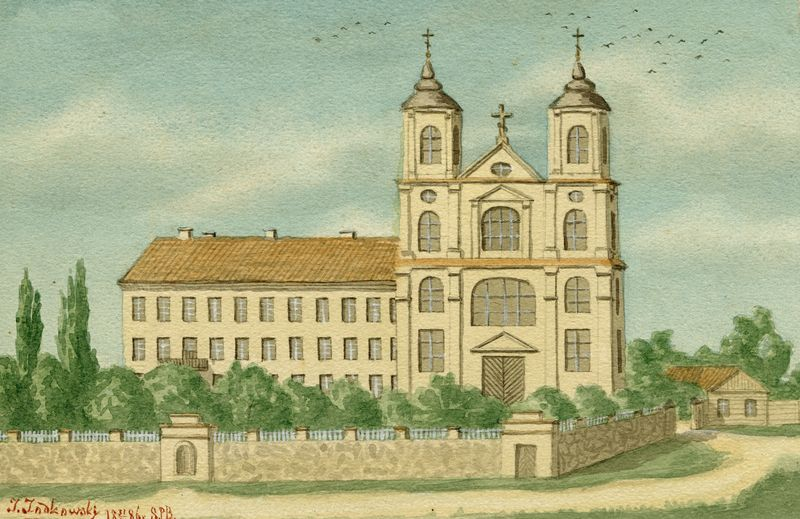 Беларуская (тарашкевіца): Вільня (Vilnia), Трынапаль (Trynapal). Касьцёл Найсьвяцейшай Тройцы і кляштар трынітарыяў